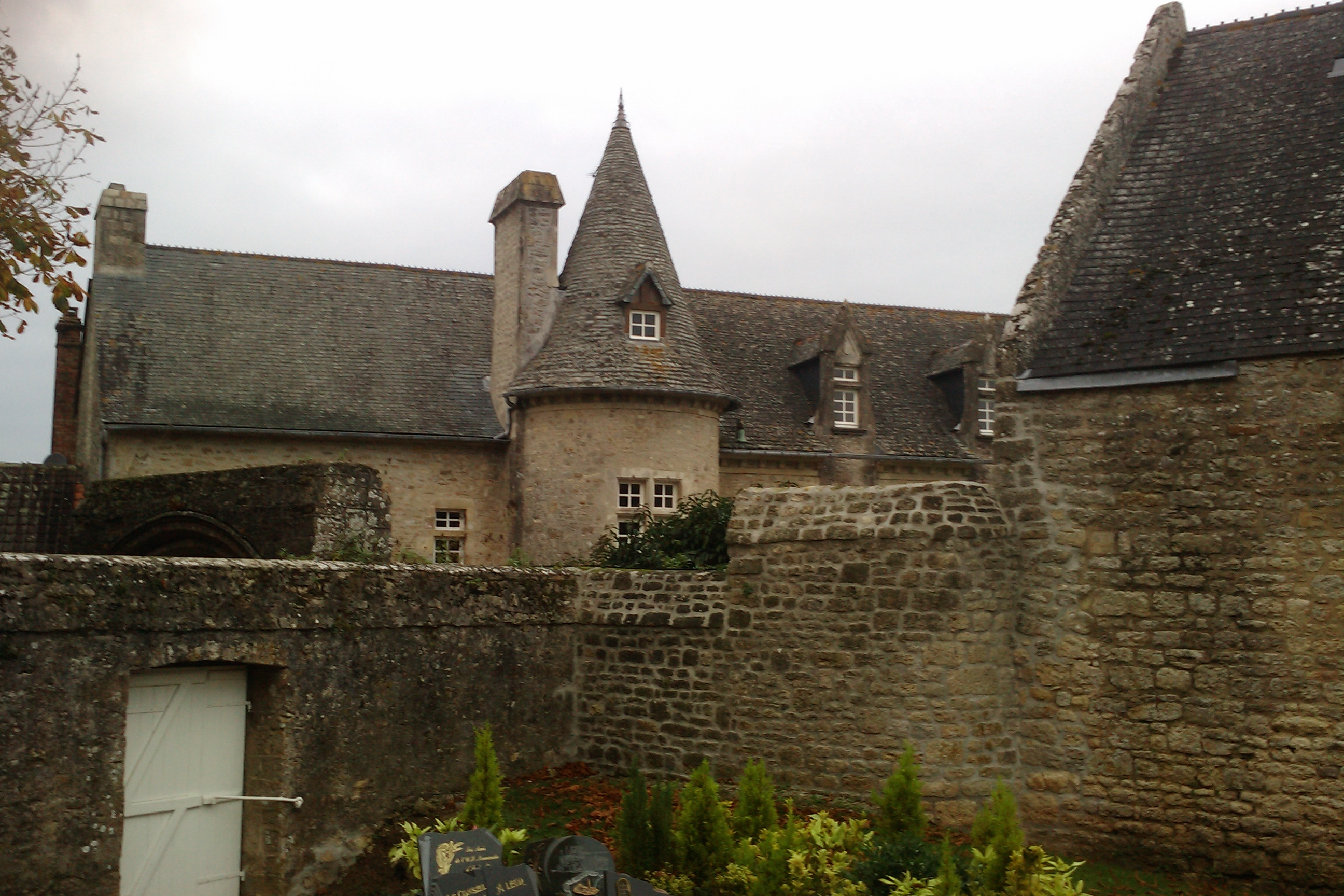 Manoir de La Cour (16e - 20e), reconstruit après la Seconde Guerre mondial